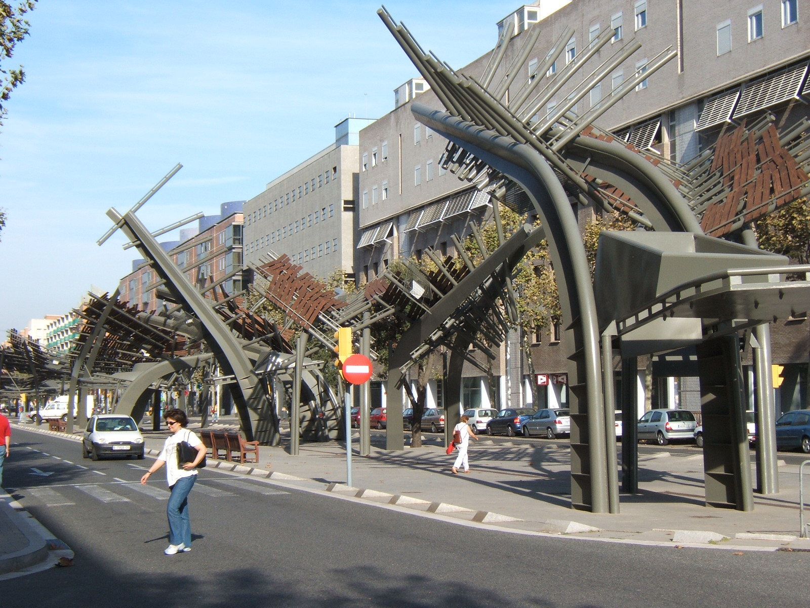 Avinguda Icària, Olympic Village, Barcelona